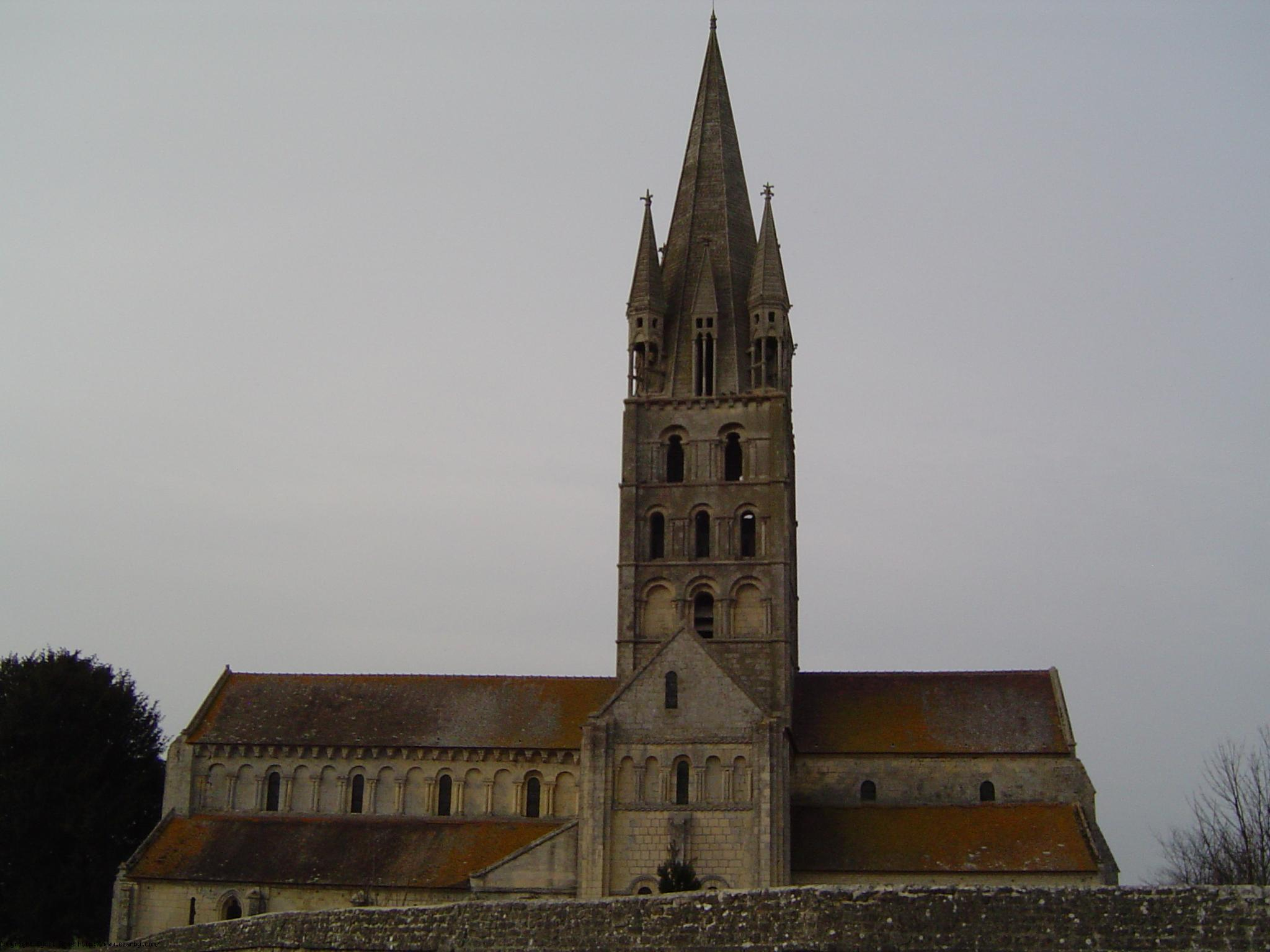 Église de Secqueville-en-Bessin